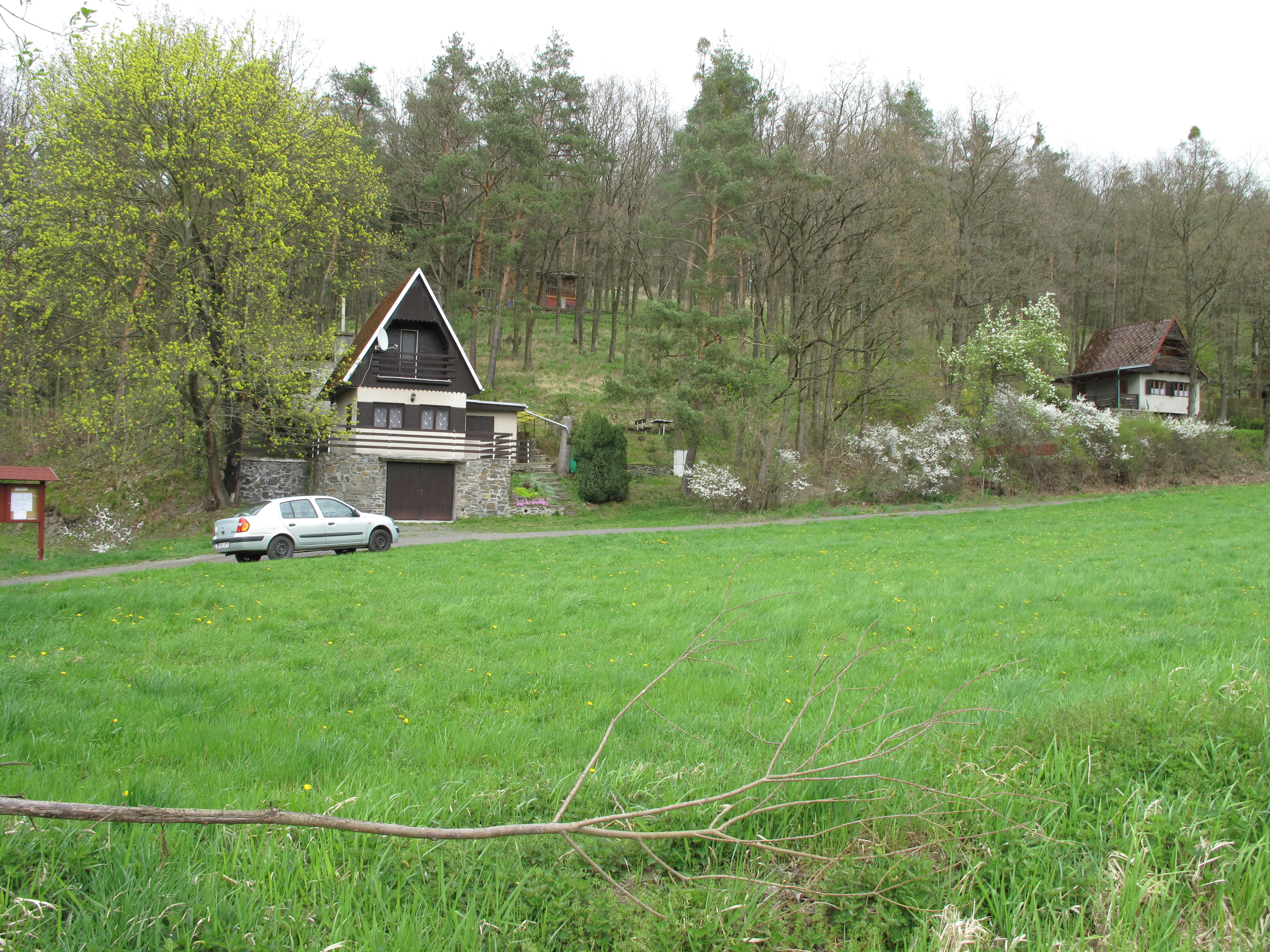 Komošín. Okres Klatovy, Česká republika.